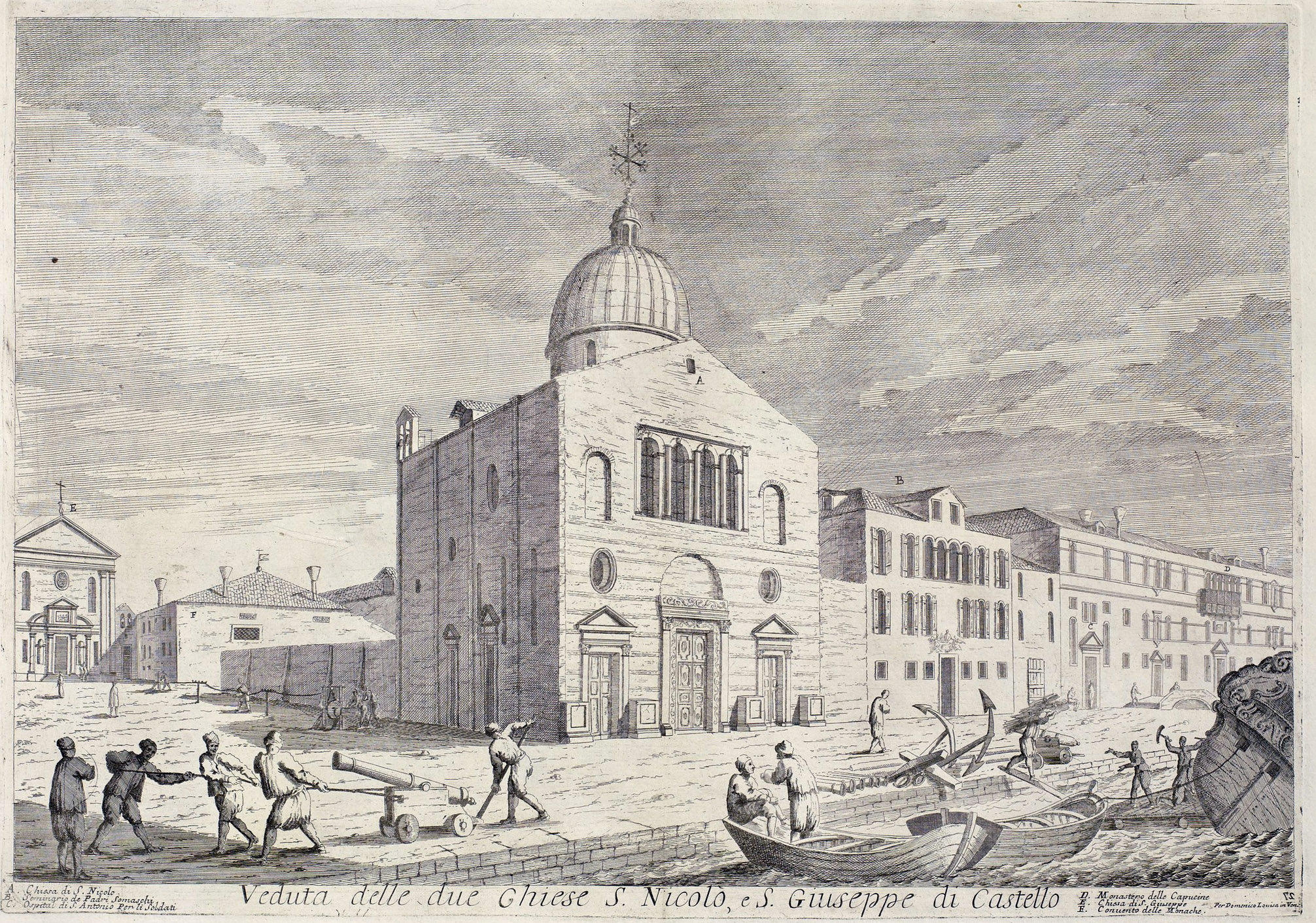 Chiesa di San Nicolò di Castello ed ospedale dei marinai. Sullo sfondo a sinistra la chiesa di San Giuseppe